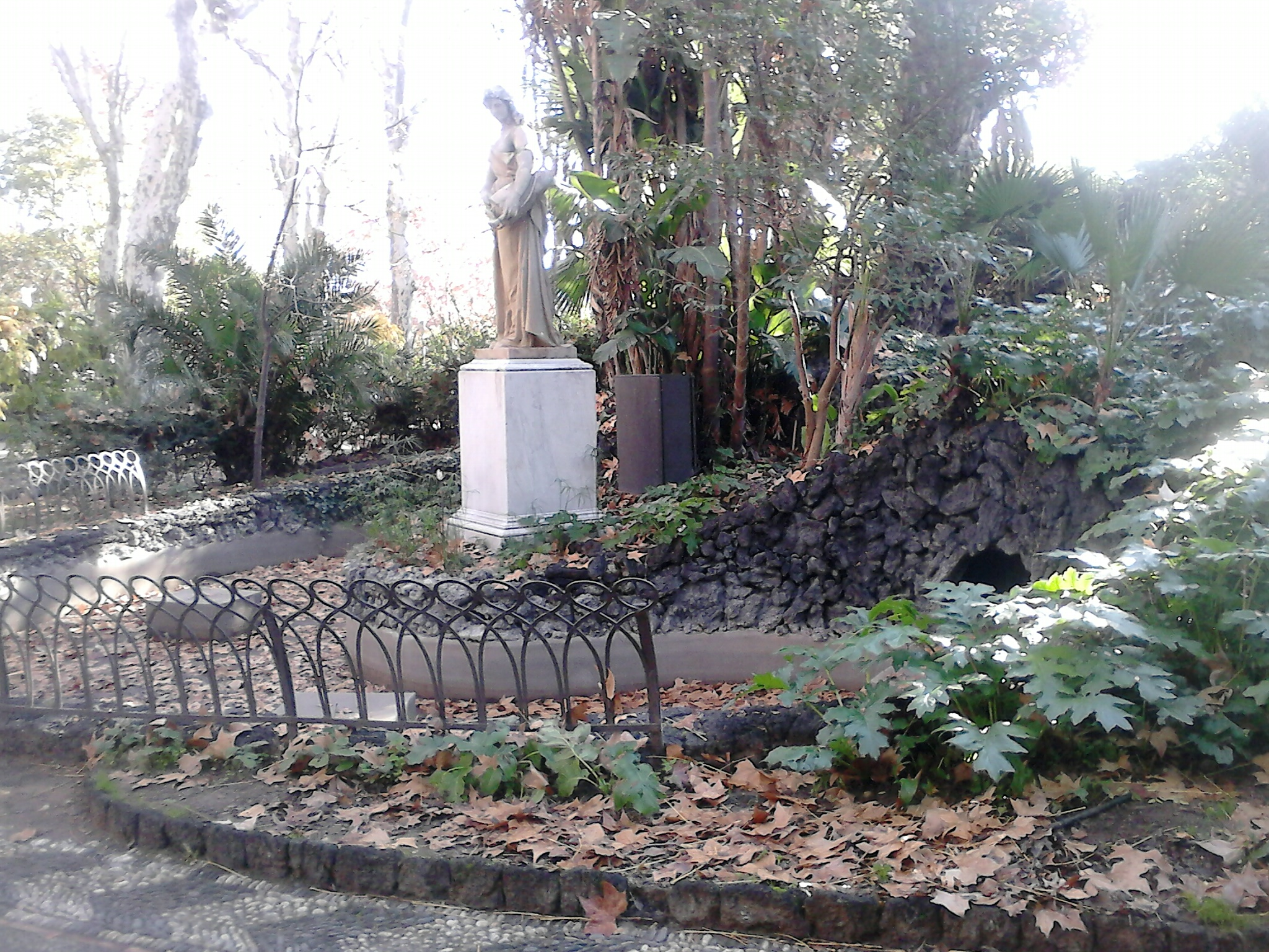 Laghetto e fontana lato nord (p.zza Roma) asciutti